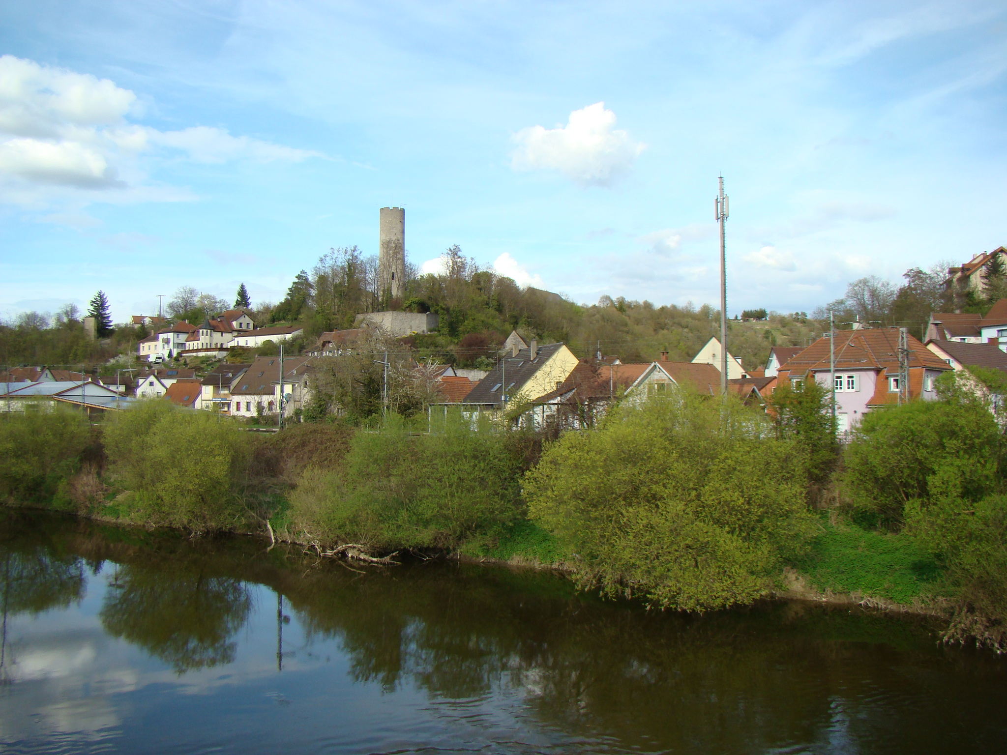 Neudenau-Herbolzheim mit Heriboldisburg